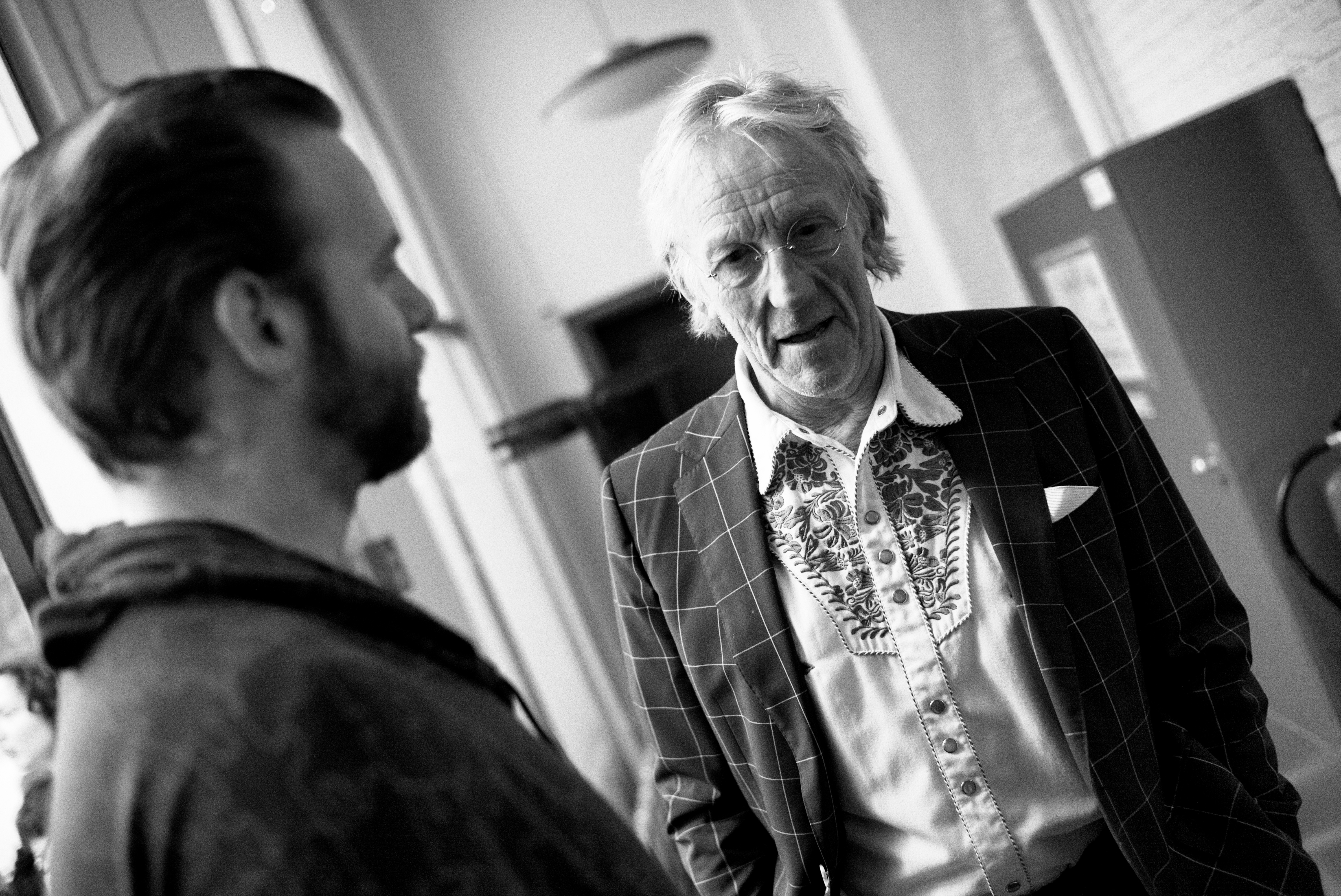 L1002051